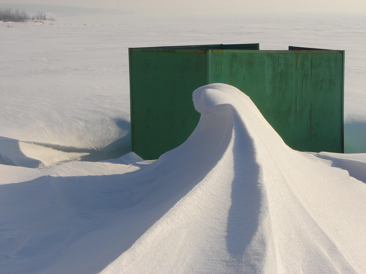 Vague de neige sculptée par les tourbillons du vent dans une cabine pour se changer sur une plage de la mer de l'Ob (Obskoe more), à Akademgorodok, près de Novosibirsk (Russie)